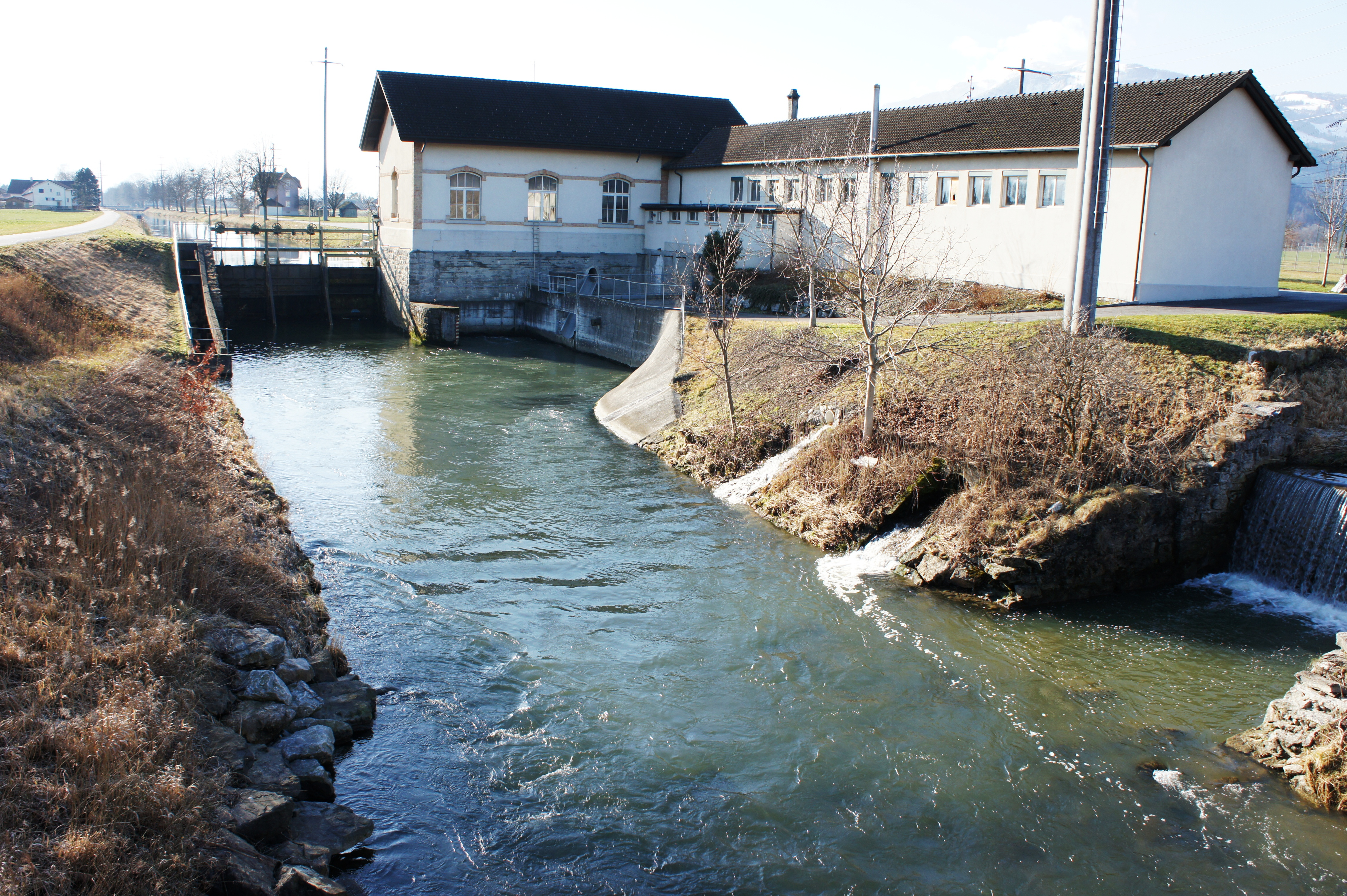 Blick aus Norden auf die Zentrale Montlingen der Rheintaler Binnenkanalkraftwerke. Rechts das Betriebsgebäude, in der Mitte das Kraftwerk und links das Wehr. Links vom Wehr ist die Fischtreppe zu sehen. Rechts am Bildrand ist die Mündung des Dürrenbaches in den Rheintaler Binnenkanal zu erkennen.